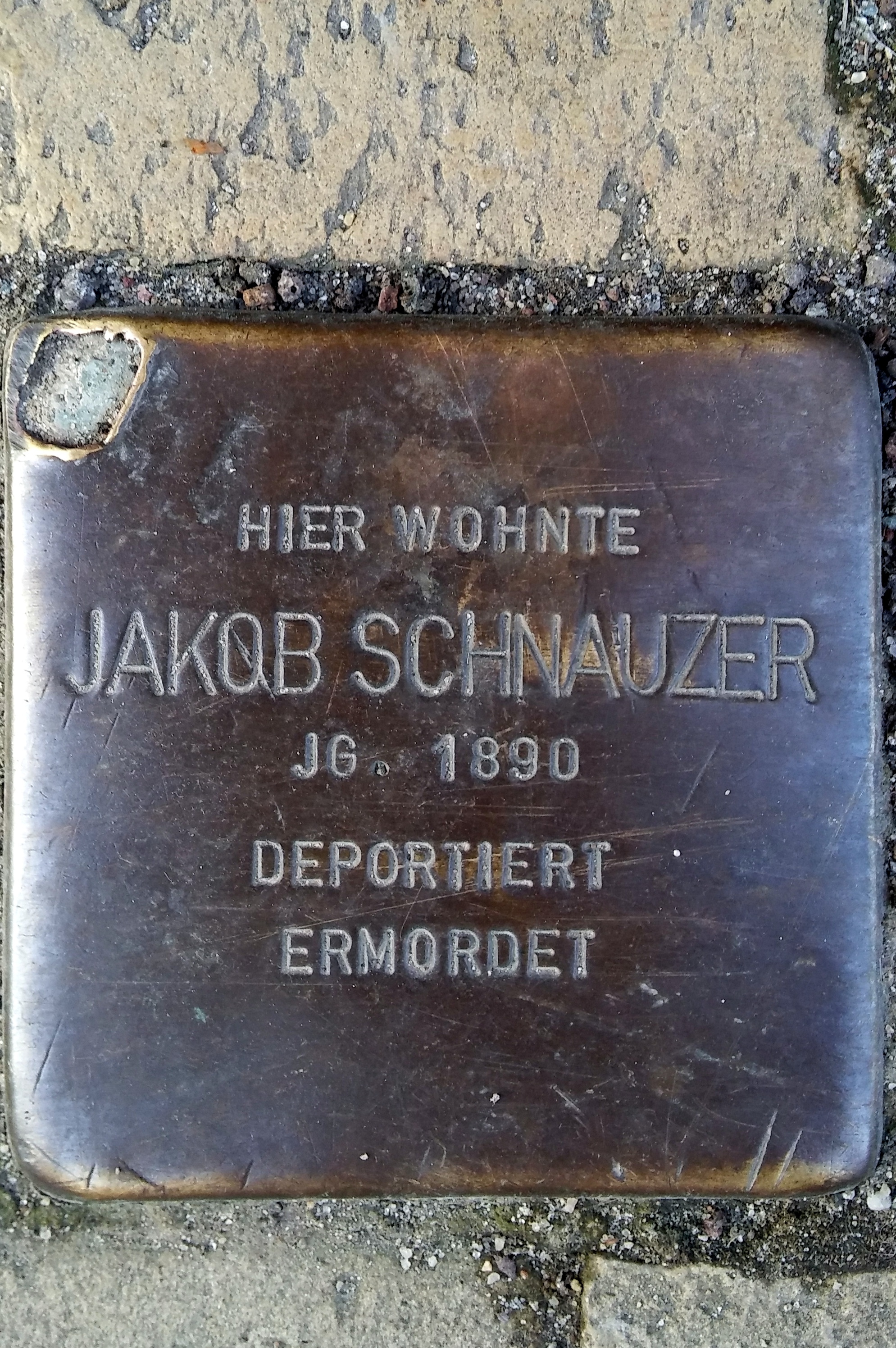 Stralsund, Frankenstraße 51, Stolperstein Jakob Schnauzer